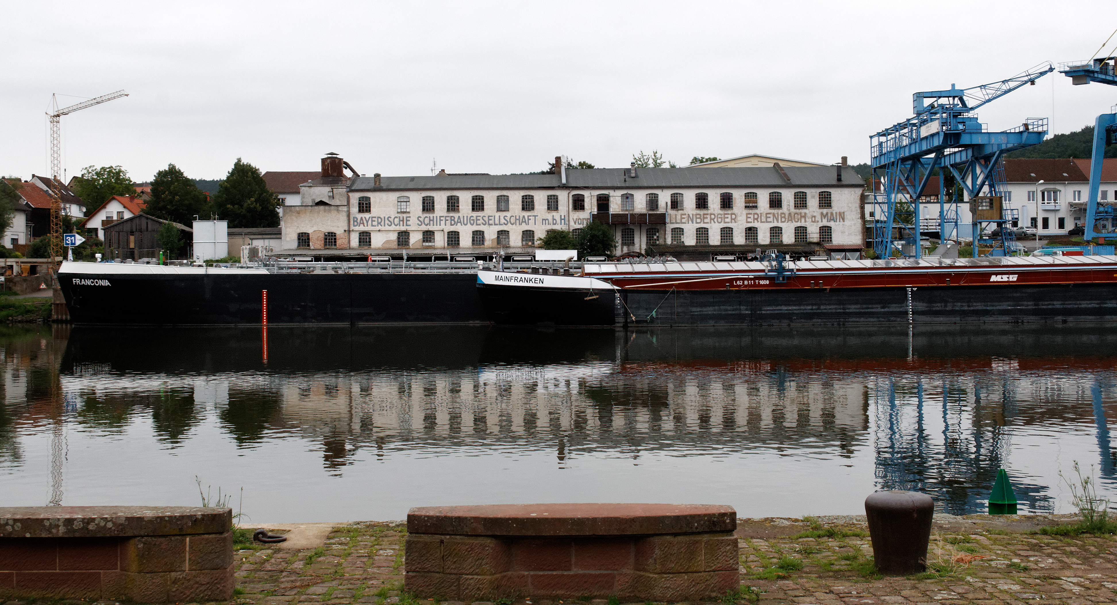 Erlenbacher Schiffswerft Maschinen- und Stahlbau GmbH, firmierte früher als Bayerische Schiffbaugesellschaft mbH, davor Werft Schellenberger.